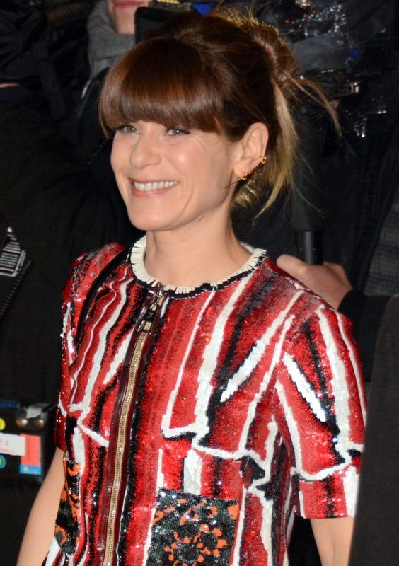 Marina Foïs à la cérémonie des César